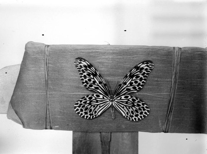 Repronegatief. Vlinder (Hestia logani - tegenwoordige naam Idea stolli logani)